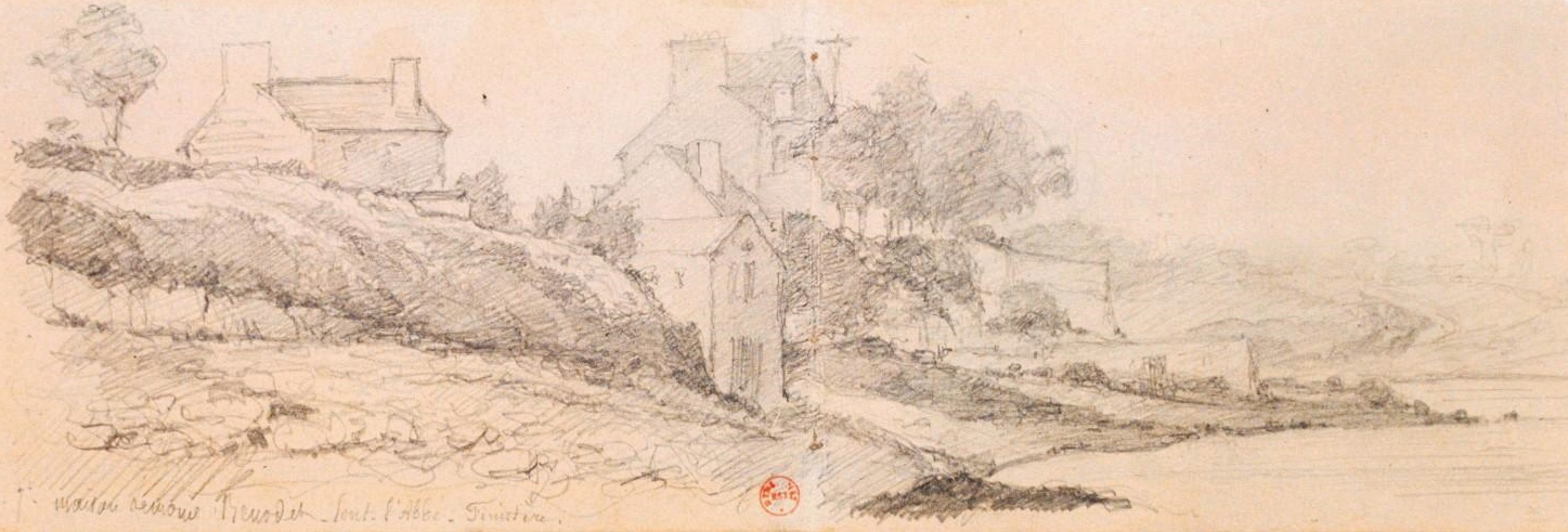 Maison Lemoine à Bénodet (dessin à la mine de plomb, auteur inconnu, 1877)